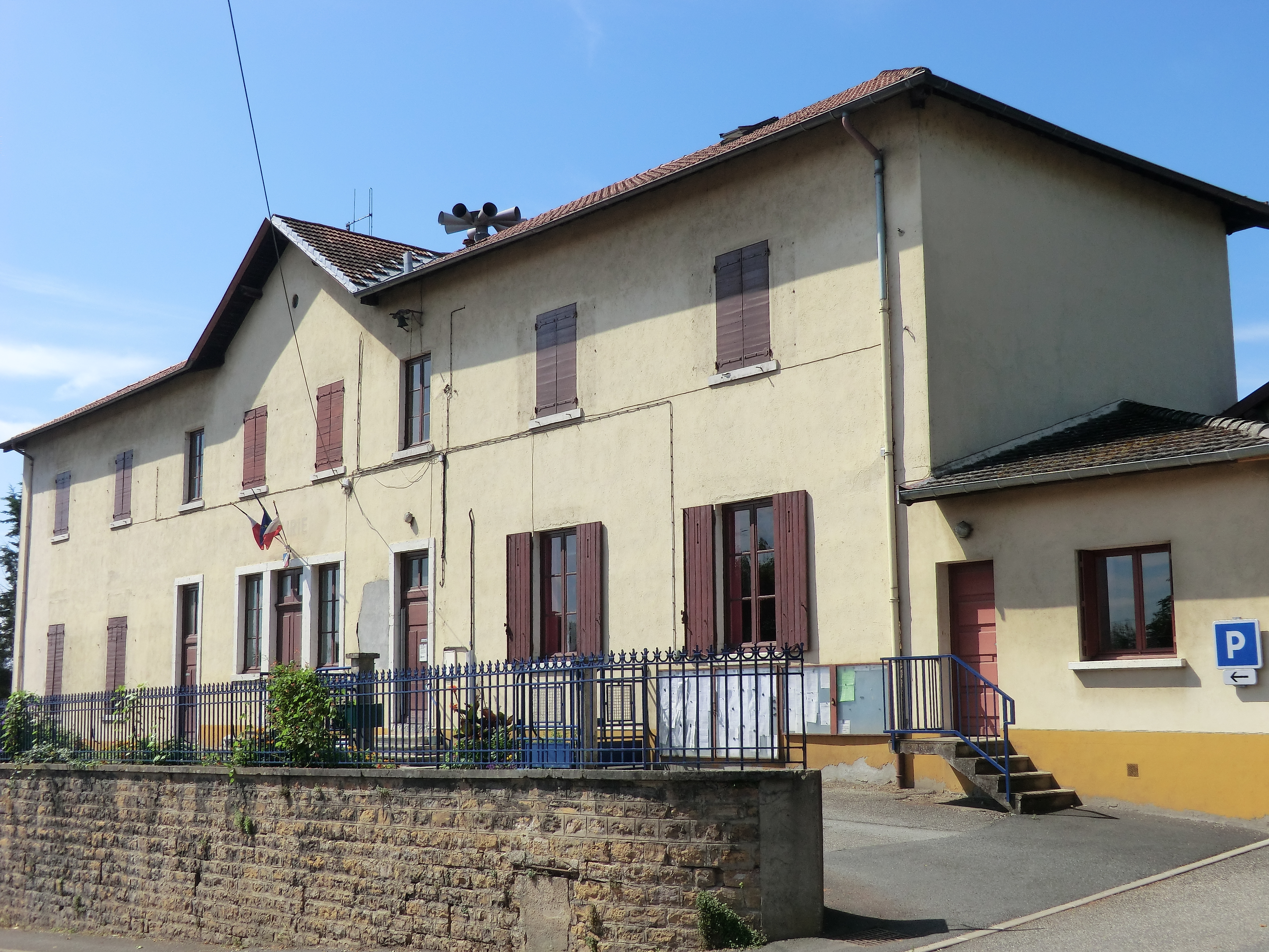 Mairie de Civrieux.